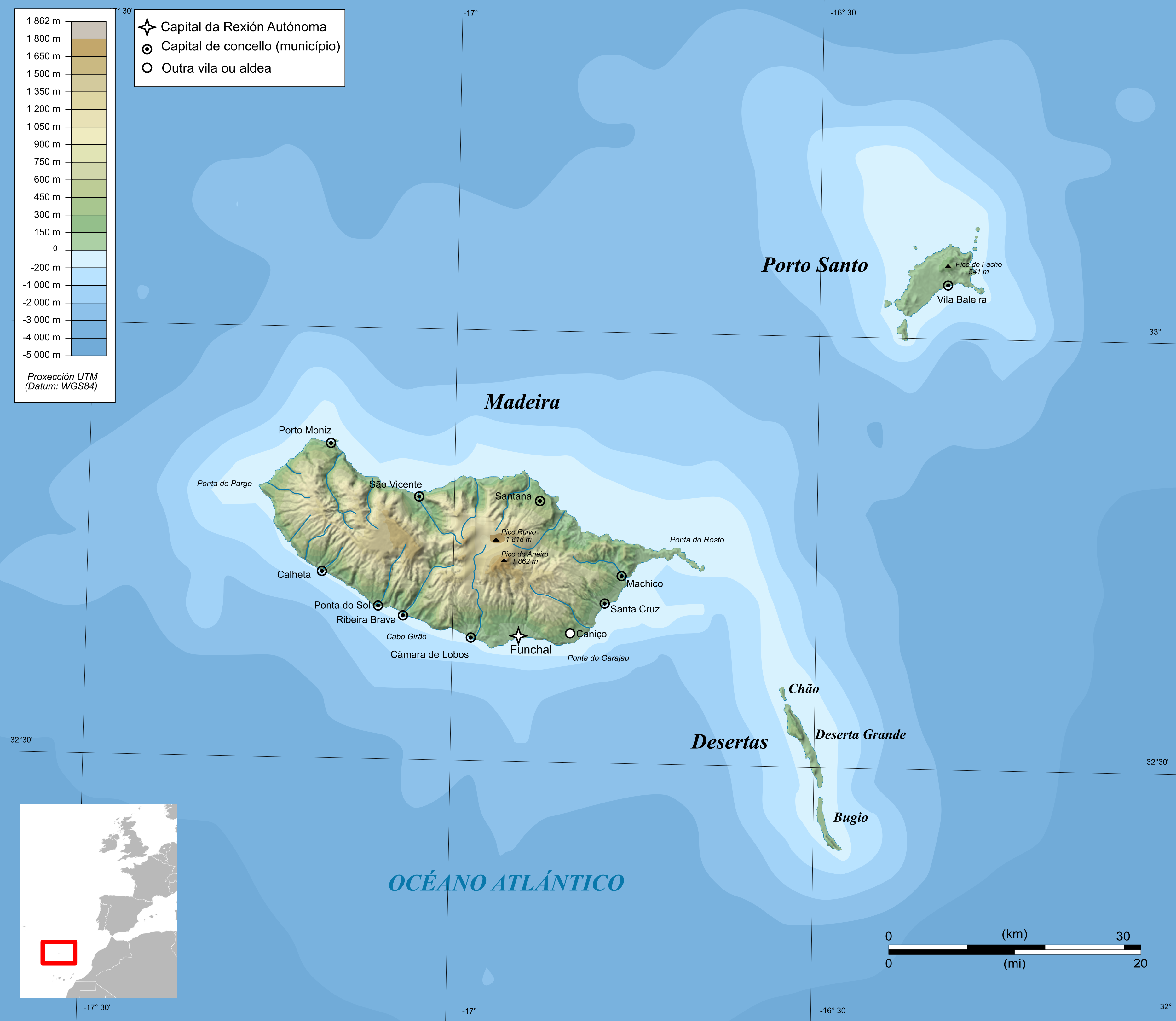 Карта МадэйрыGalego: Mapa do arquipélago de Madeira